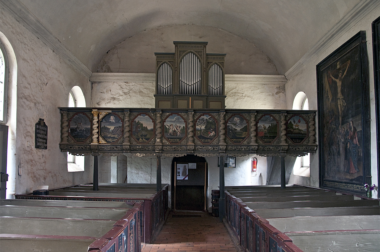 Dorfkirche Mellenthin, Orgelempore, 2009